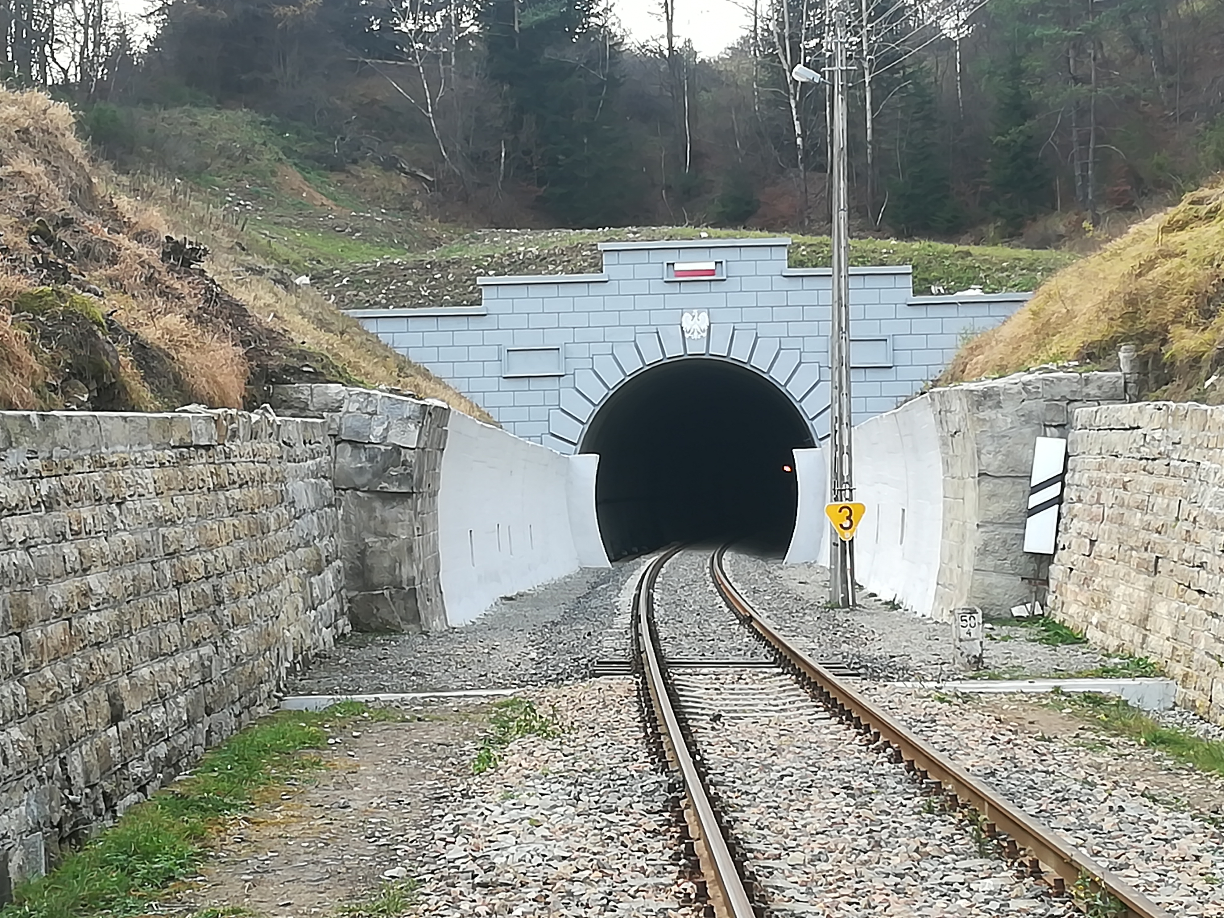 Tunel kolejowy w Łupkowie od strony polskiej.